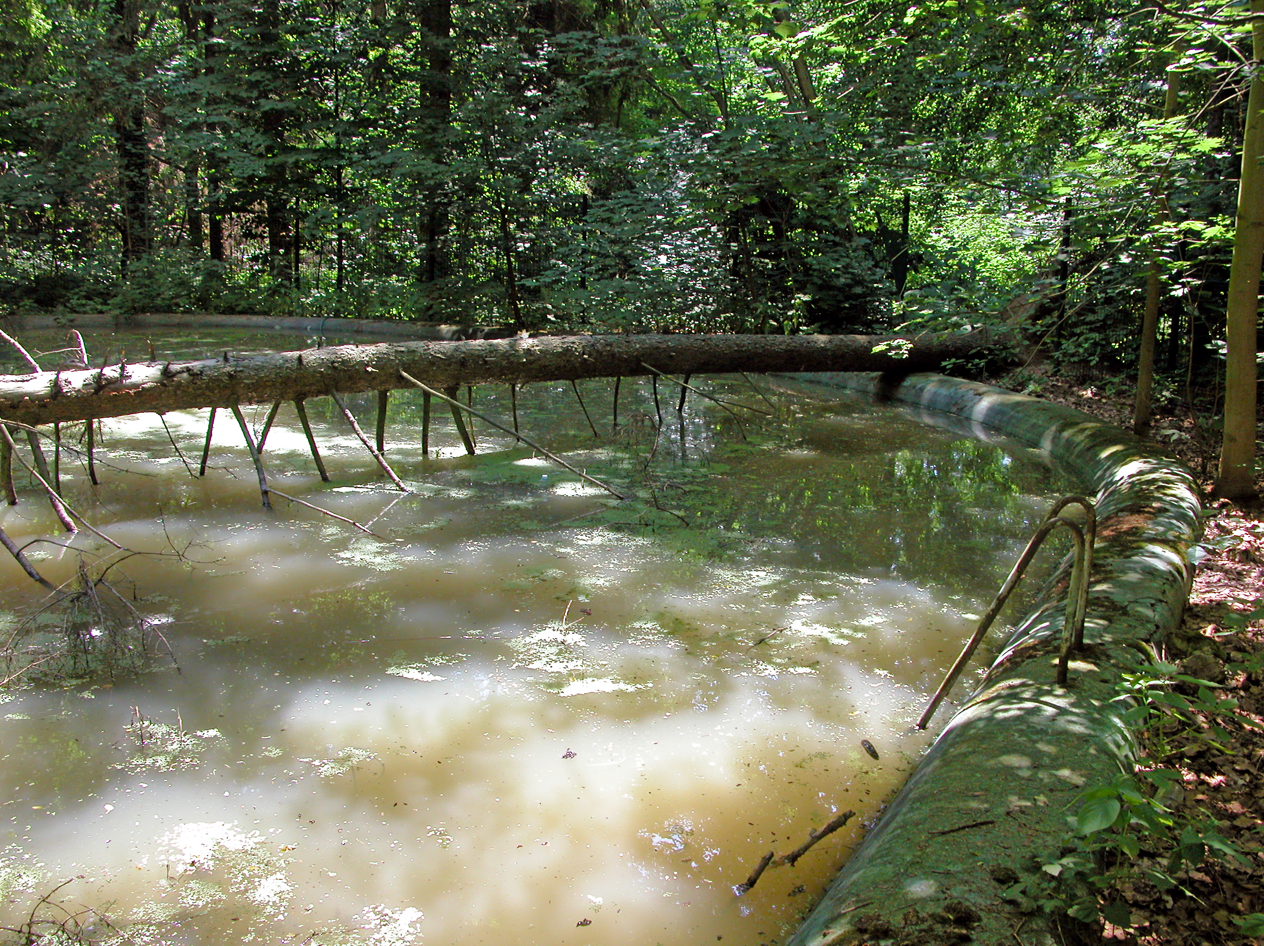 29.06.2008 01445 Radebeul: Reste vom Freibad des ehemaligen Bilz-Sanatoriums, Eduard-Bilz-Straße, 200 m oberhalb vom Sanatorium am Hohlweg im Wald. [DSCN33289.TIF]20080629235DR.JPG(c)Blobelt